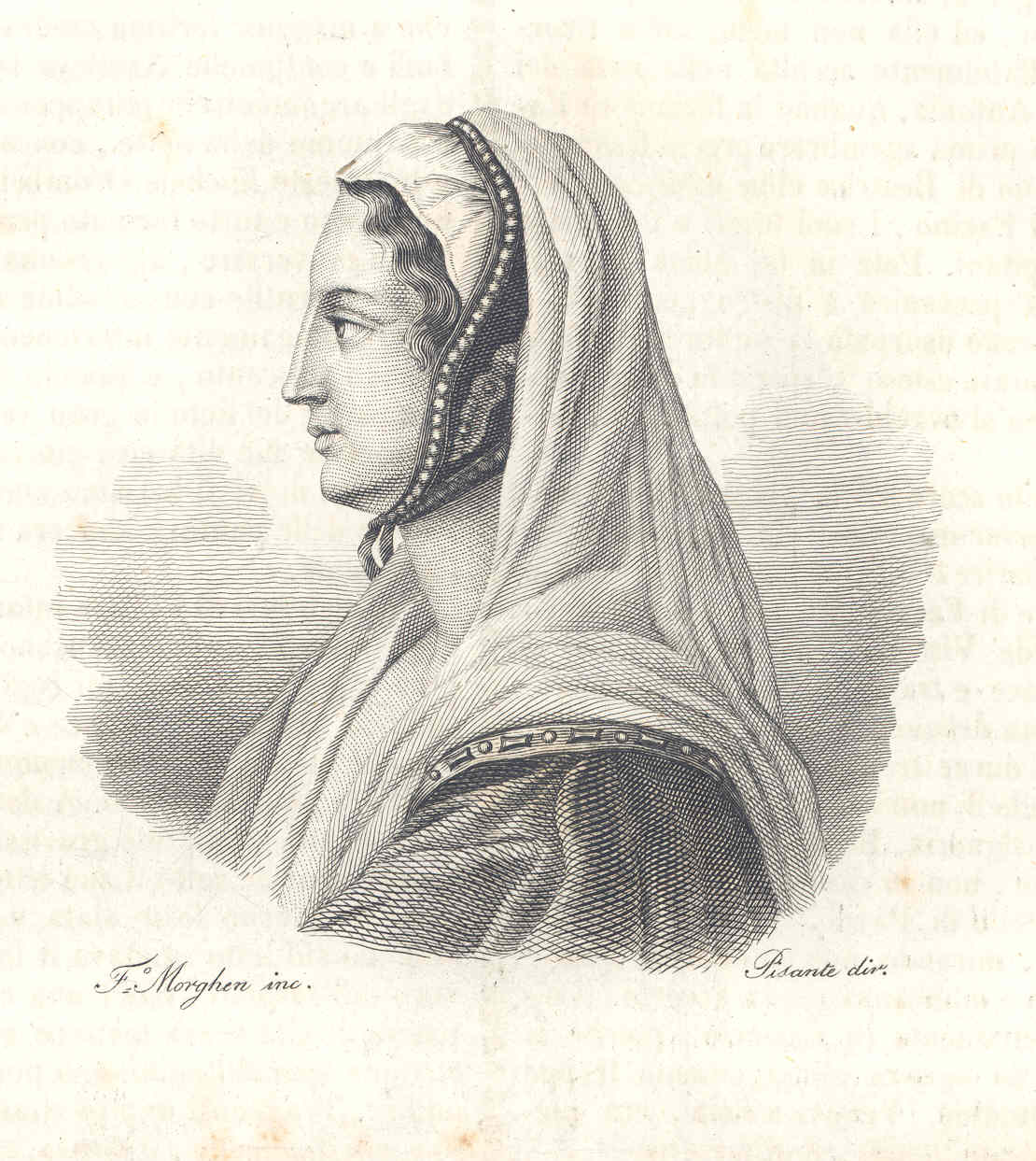 Riproduzione da stampa ottocentesca, ritratto di Beatrice di Tenda.